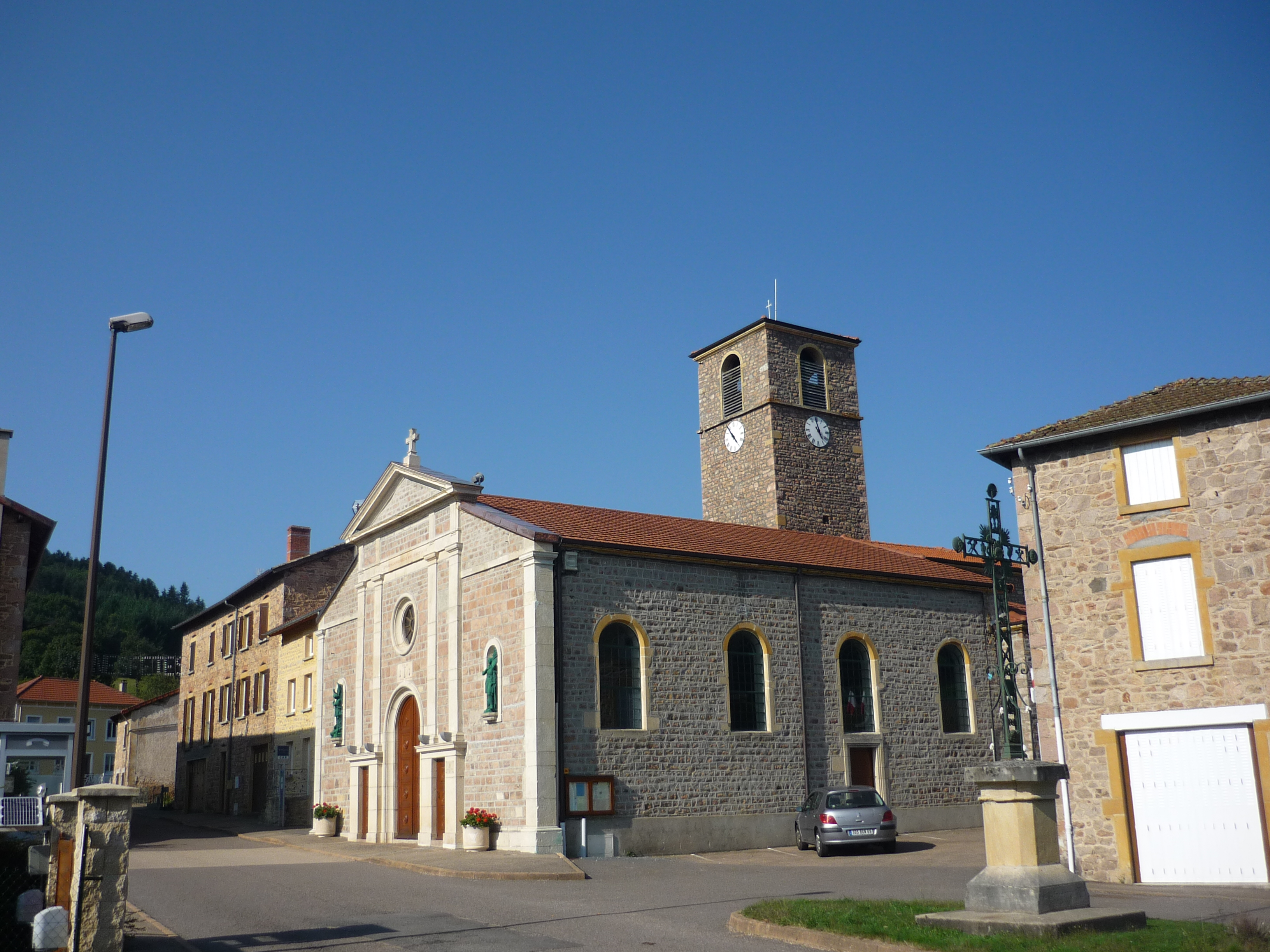 Église de La Chapelle-de-Mardore